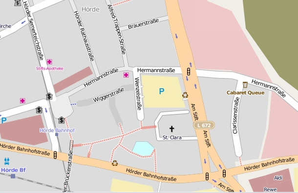 Lage der Wenzelstrasse in Dortmund Hörde